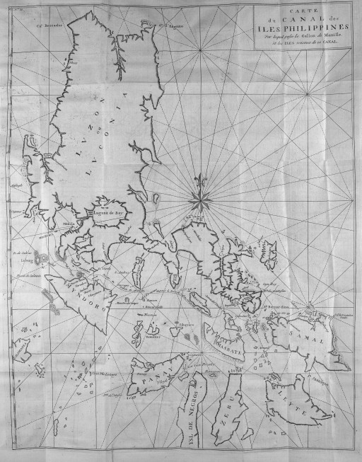 [Illustrations de Voyage autour du monde] Auteur : George Anson Éditeur : Henri-Albert Gosse et Compagnie (Genève) 1750